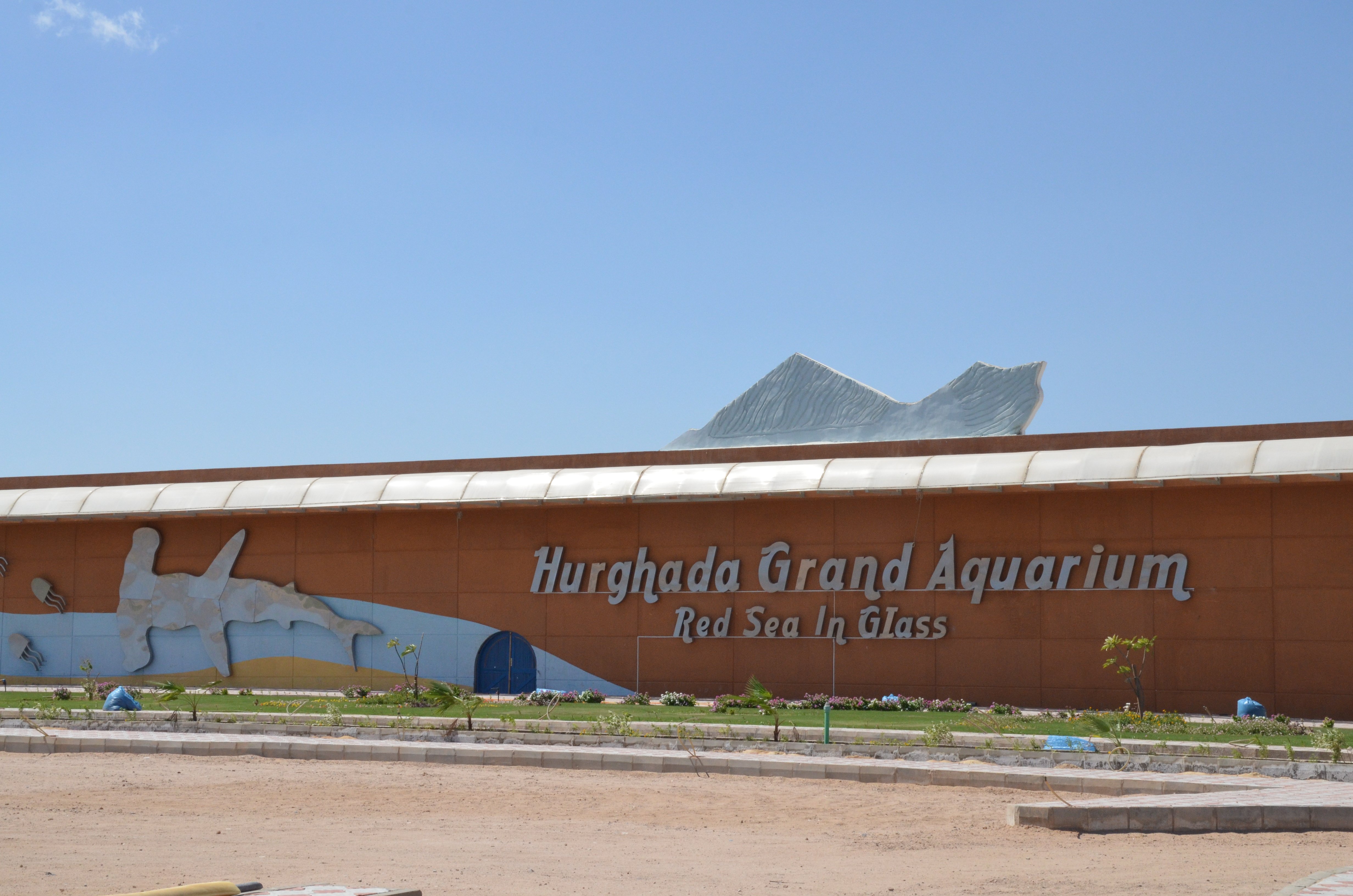 اكواريوم الغردقة الكبير